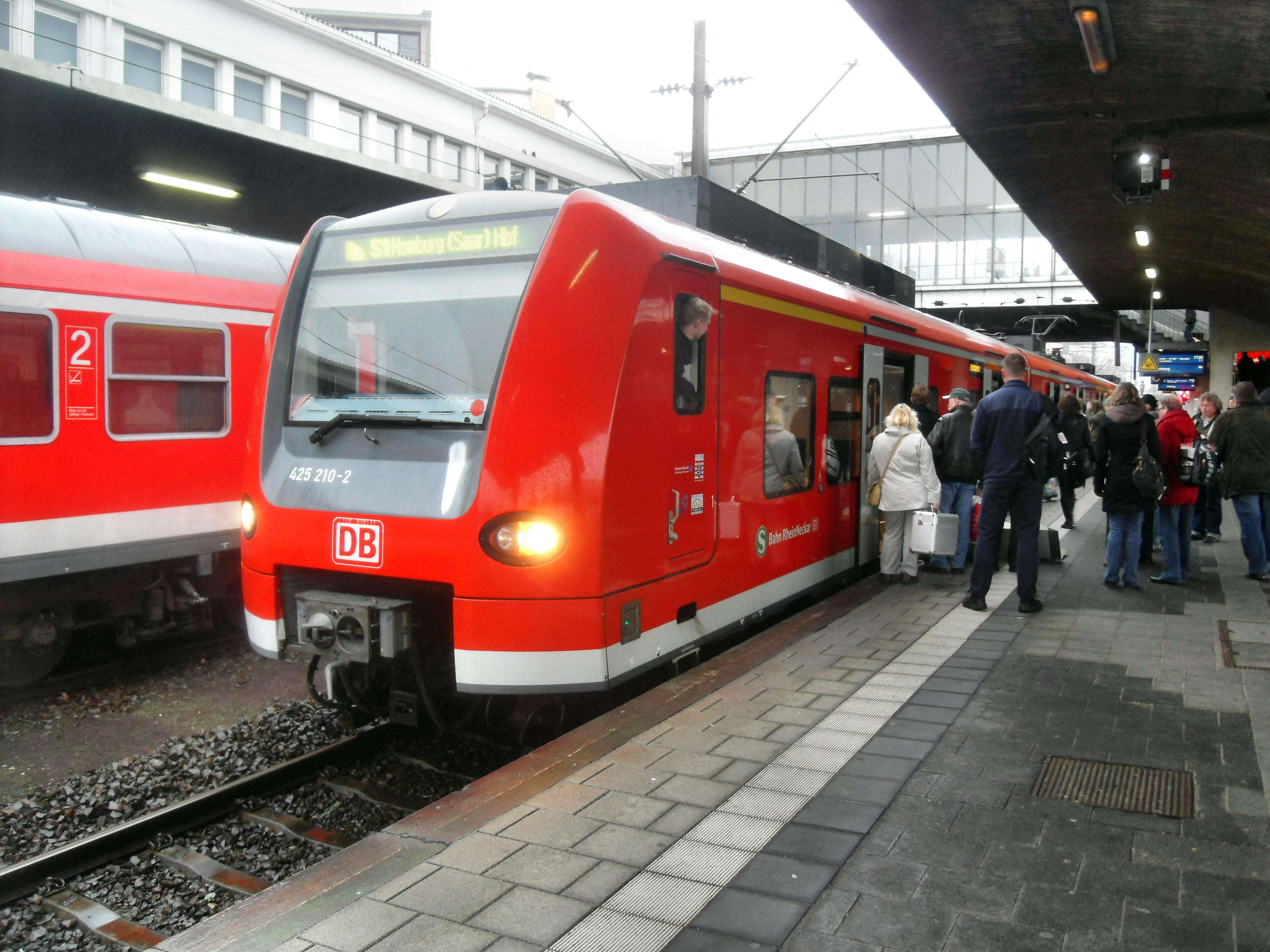 Zug der S1 der S-Bahn Rhein-Neckar im Heidelberger Hauptbahnhof in Baden-Württemberg auf dem Weg nach Homburg (Saar) im Saarland in Deutschland